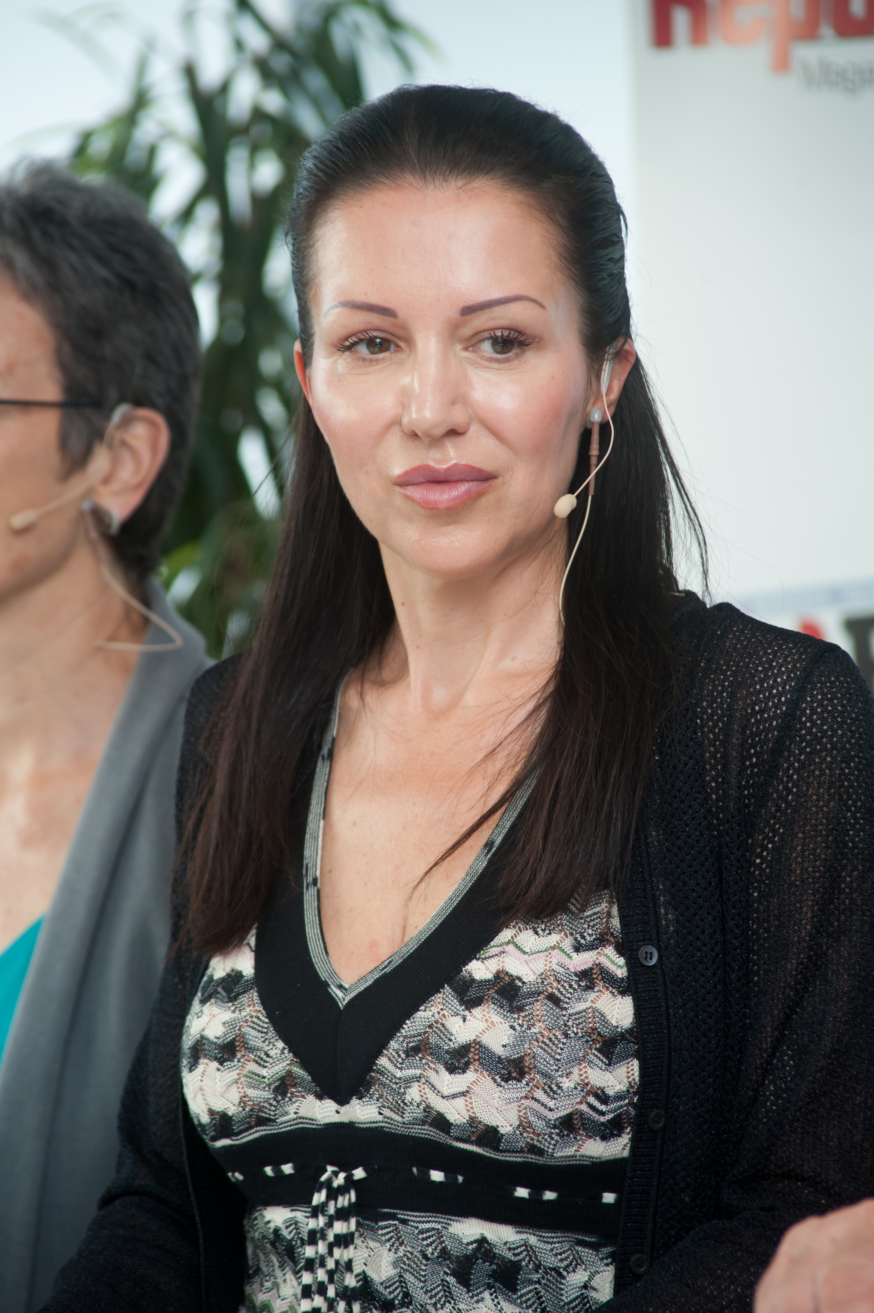 Barbara Kappel, FPÖ Fotos: Milena Krobath